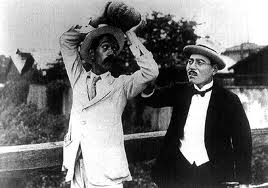 『カボチヤ』、1928年、スチル写真